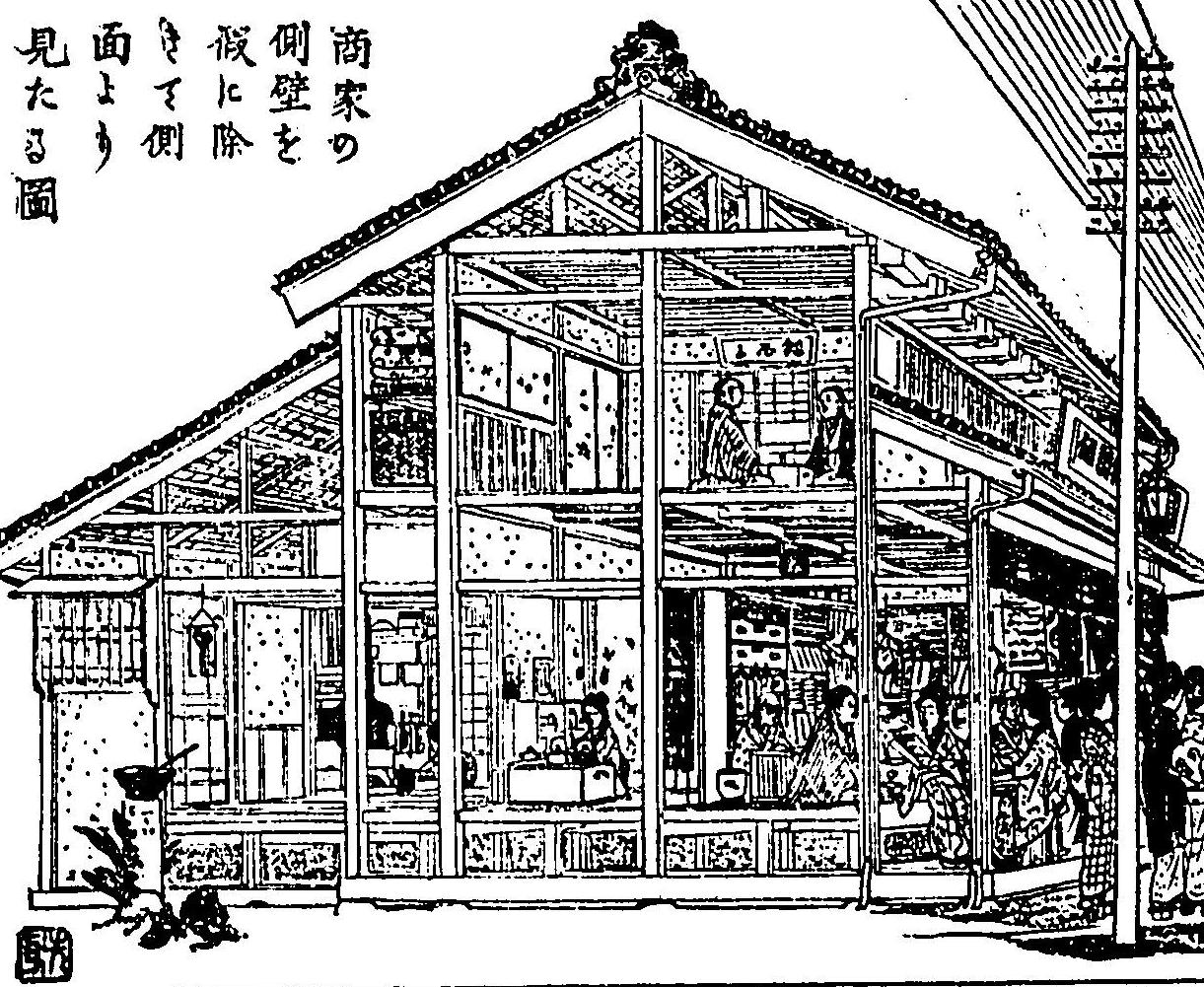 東京の前土間型町屋の断面図。